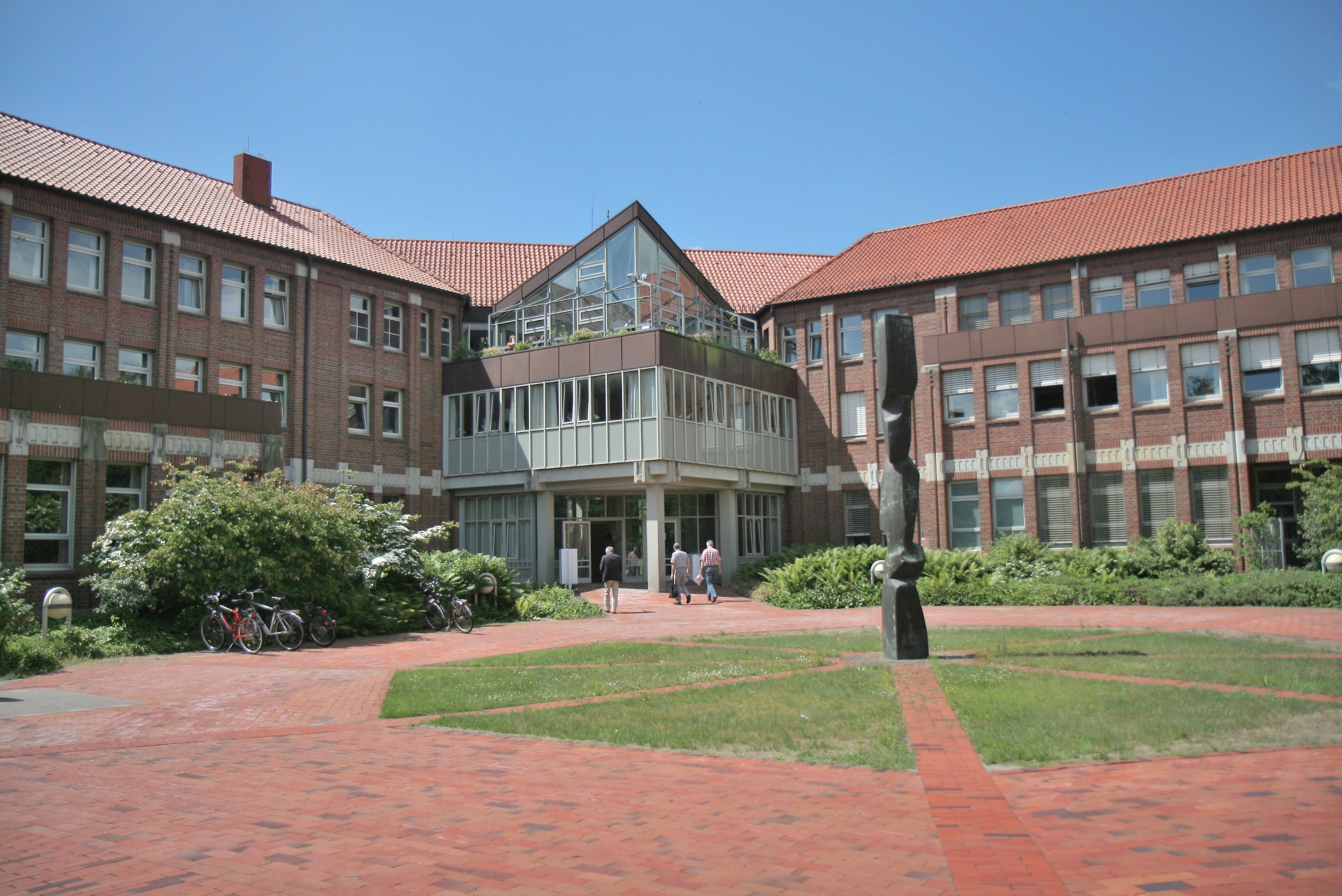 Schleswig-Holsteinisches Landesverfassungsgericht, Schleswig-Holsteinisches Oberverwaltungsgericht, Schleswig-Holsteinisches Verwaltungsgericht und Sozialgericht Schleswig in Schleswig, Brockdorff-Rantzaustraße 13.